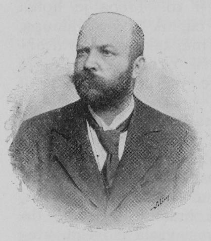 Portrait of Augustin Eugen Mužík (1859 - 1925), Czech poet.